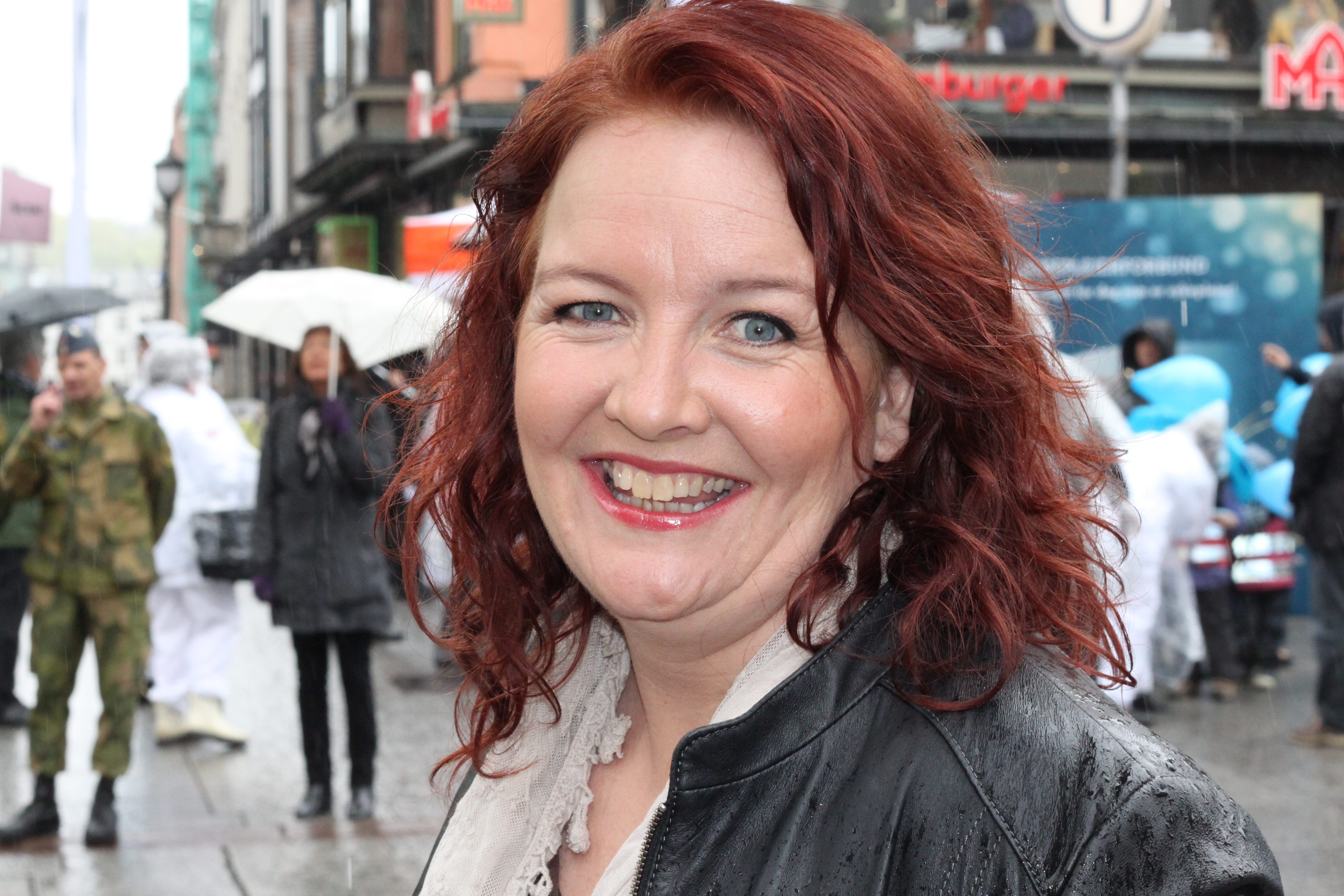 Stortingsrepresentant for KrF